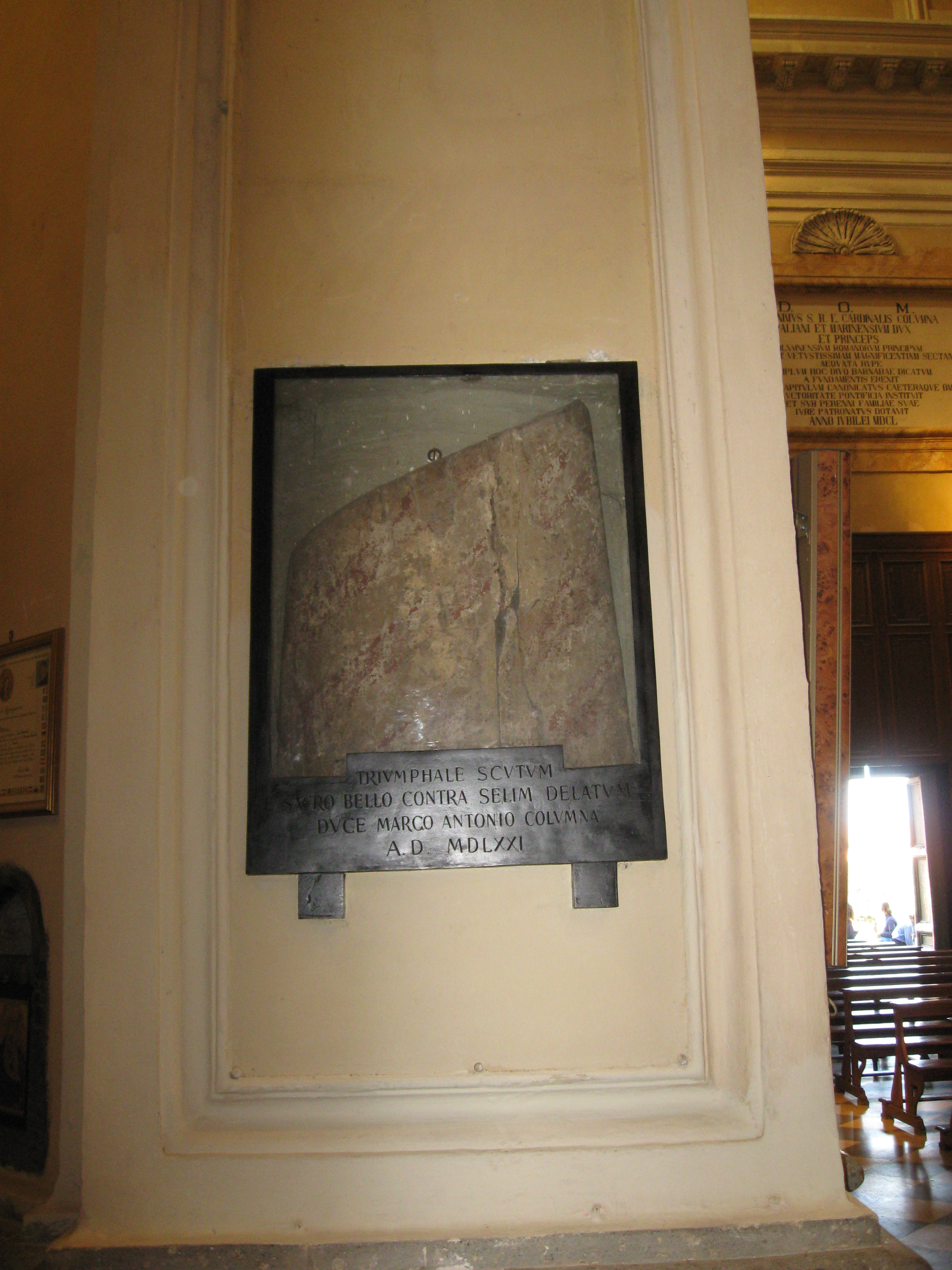 Lo scudo turco catturato durante la battaglia di Lepanto (1571) nella Basilica di San Barnaba a Marino (RM)